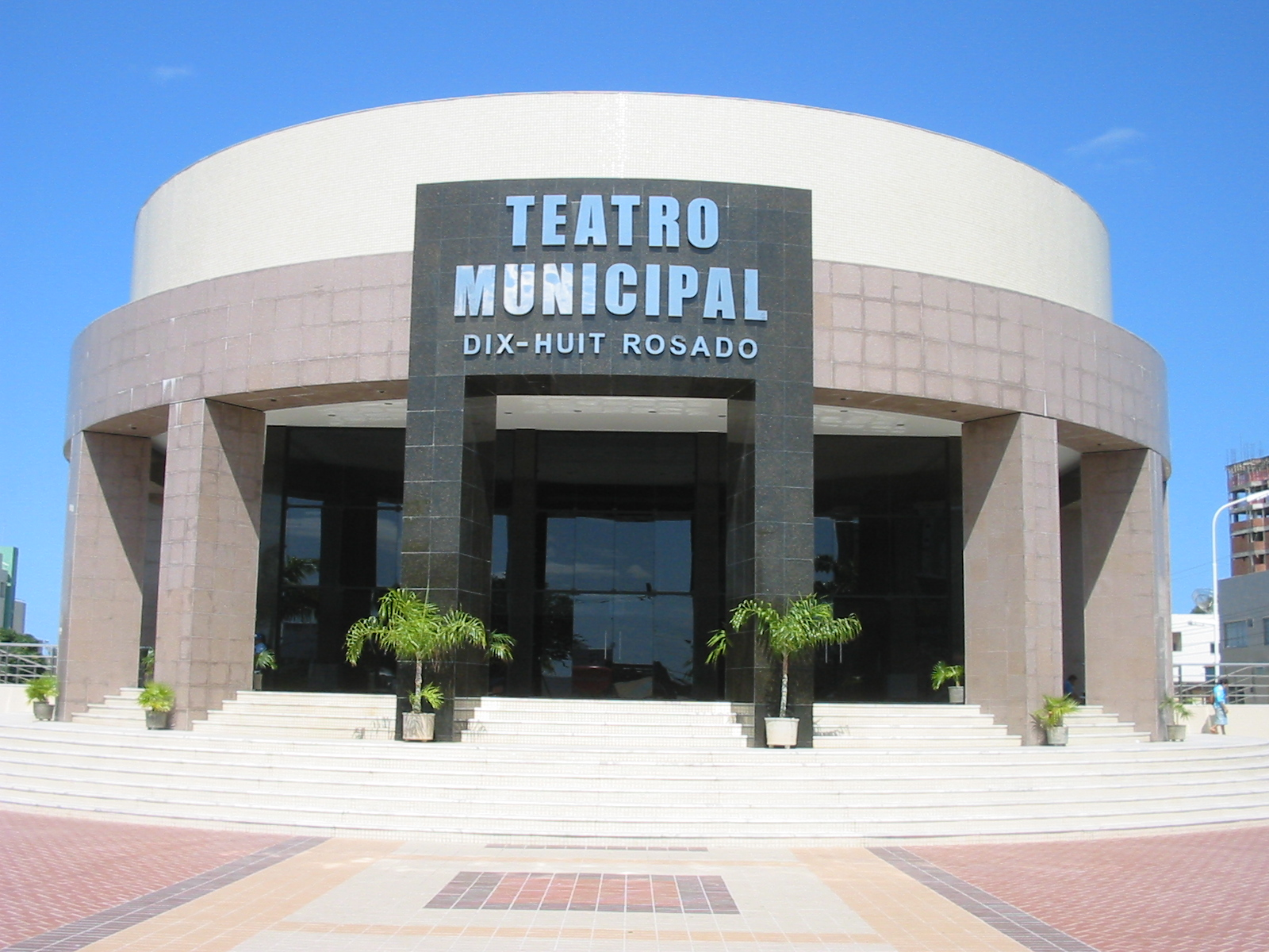 Mossoró (Rio Grande do Norte), Brasil. Teatro Dix-Huit Rosado. Dix-Huit Rosado Theatre building. Mossoró (Rio Grande do Norte), Brazil.